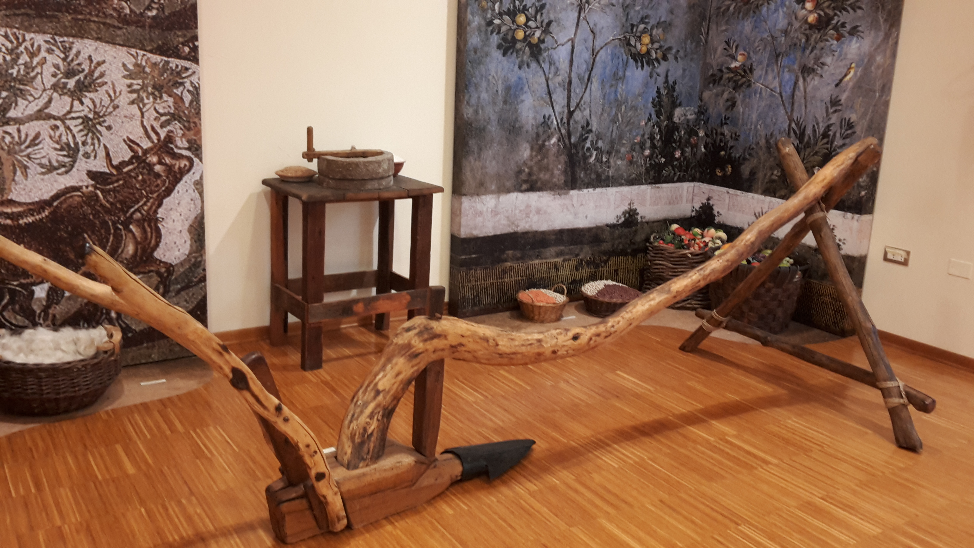 centuriazione1